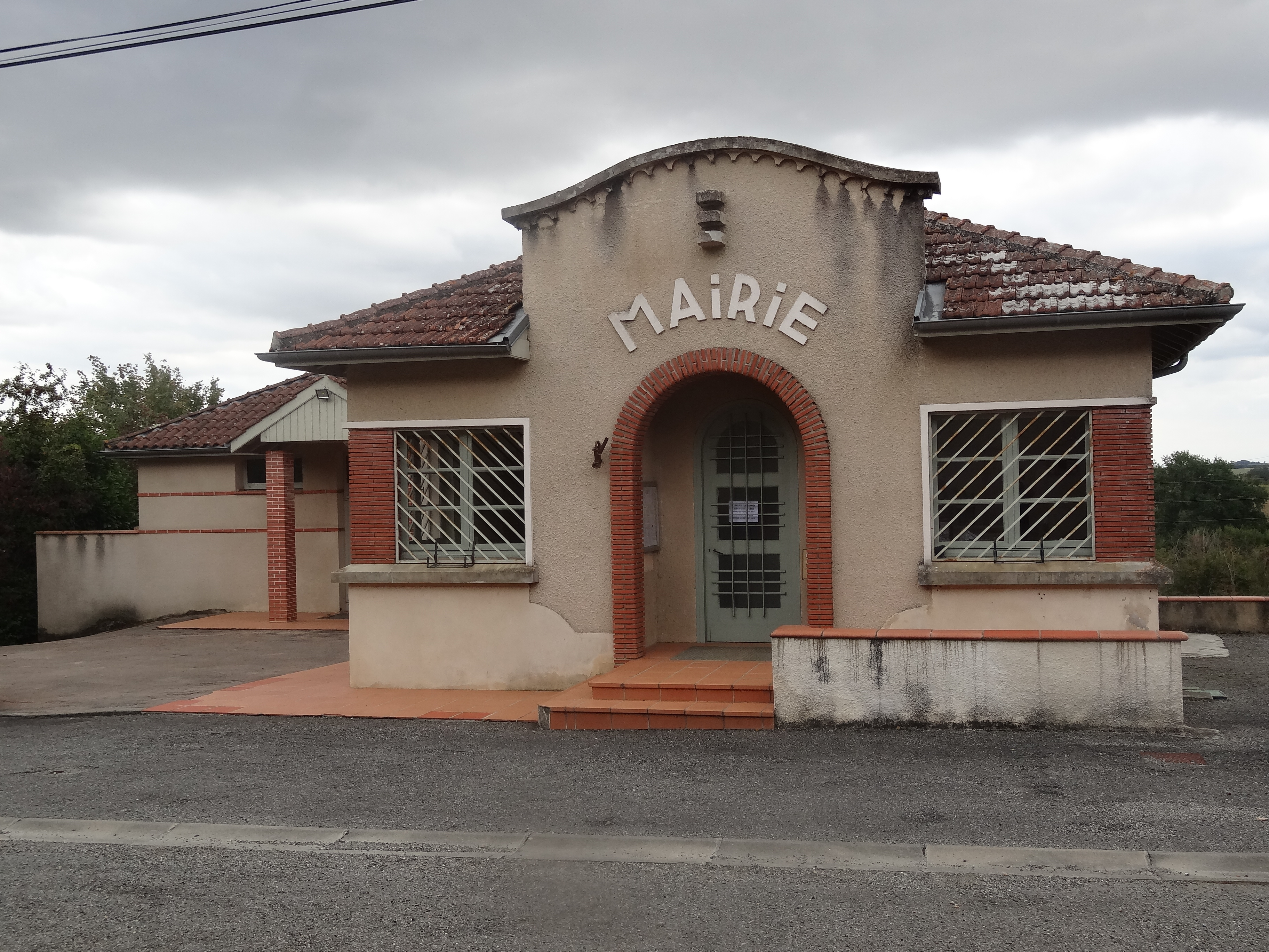 Mairie de Saint-Caprais dans le Gers.